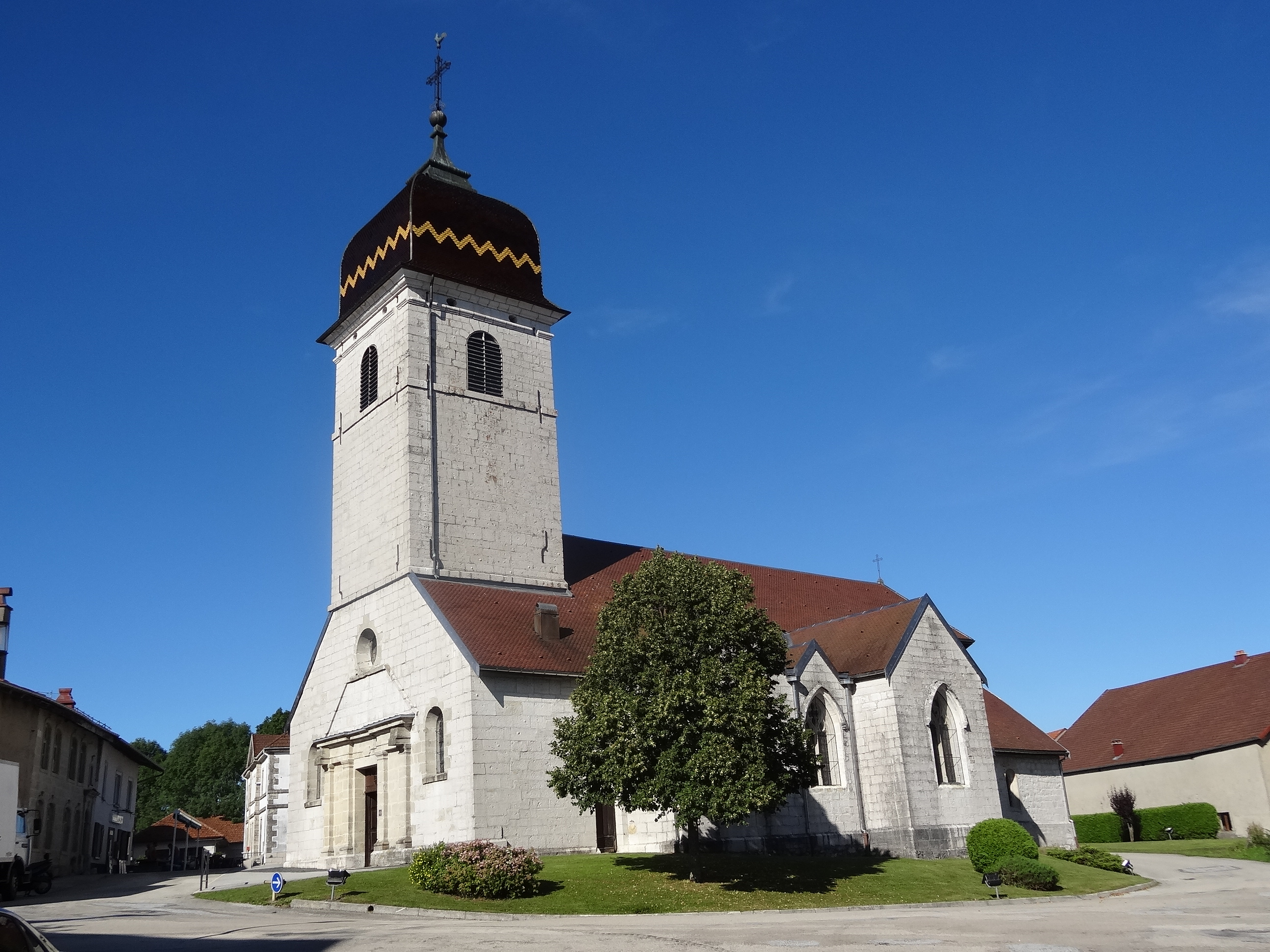 La Rivière-Drugeon (Doubs) - église paroissiale